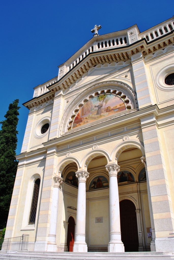 Parco donatori di sangue e opere (fontana, Monumento ai Donatori di sangue, Arnaldo Fusinato, Busto Giuseppe Garibaldi, Albero dei libri) This is a photo of a monument which is part of cultural heritage of Italy.